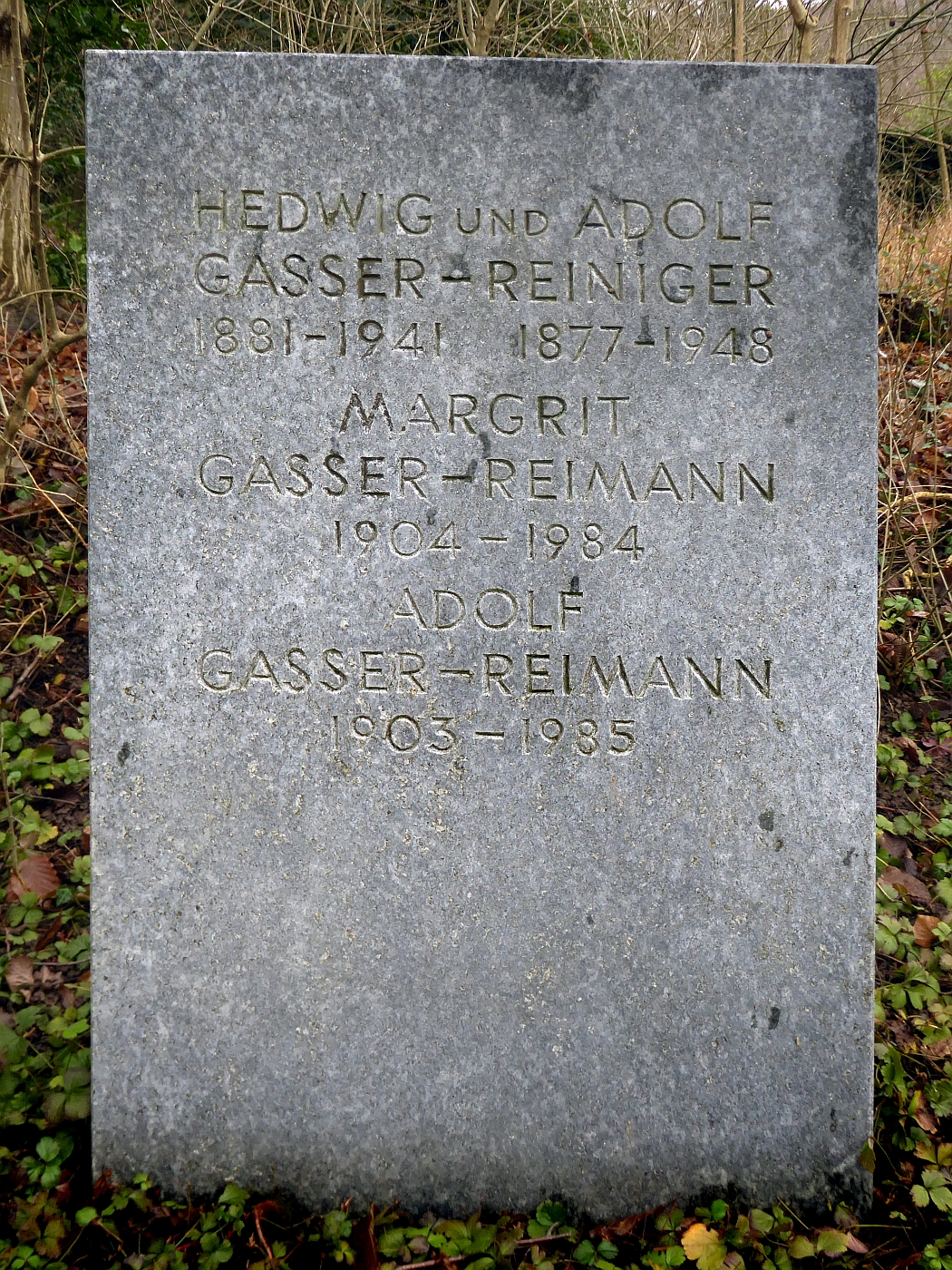 Adolf Gasser-Reimann (1903–1985) Historiker, Gymnasiallehrer, Professor, Autor u.a «Gemeindefreiheit als Rettung Europas», Politiker, Familiengrab auf dem Friedhof Hörnli, Riehen, Basel-Stadt